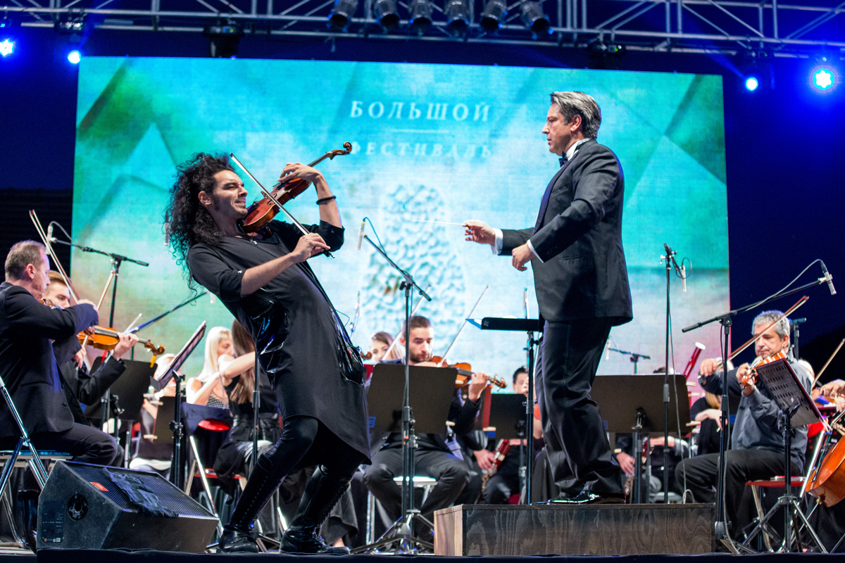 Неманья Радулович, скрипач, участник фестиваля русской музыки "Большой"